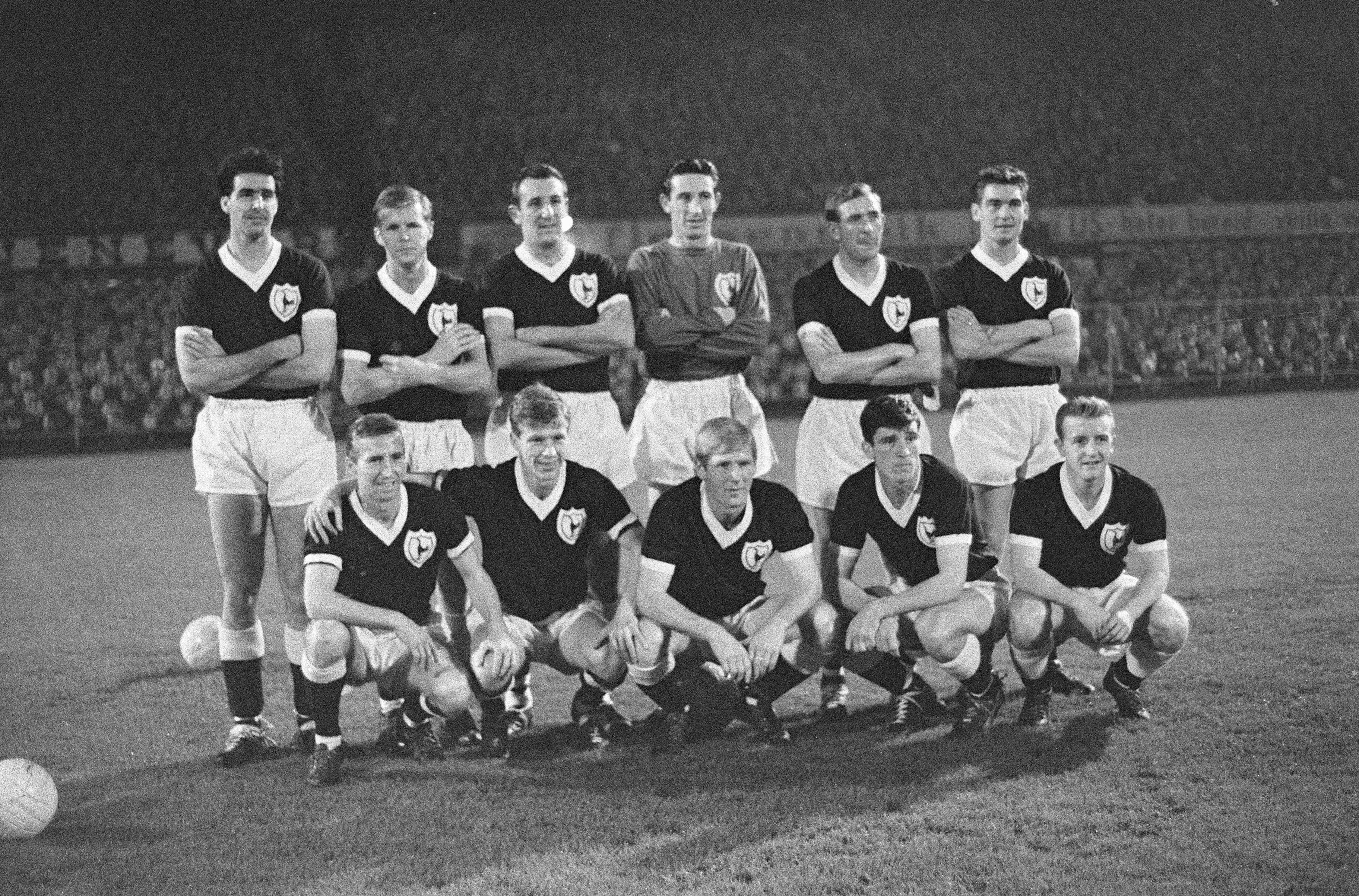 Collectie / Archief : Fotocollectie Anefo Reportage / Serie : [ onbekend ] Beschrijving : Feyenoord tegen Hotspur 1-3. Elftal Tottenham Hotspur Datum : 1 november 1961 Trefwoorden : elftallen, sport, voetbal Instellingsnaam : Feyenoord, Tottenham Hotspur Fotograaf : Pot, Harry / Anefo Auteursrechthebbende : Nationaal Archief Materiaalsoort : Negatief (zwart/wit) Nummer archiefinventaris : bekijk toegang 2.24.01.05 Bestanddeelnummer : 913-1290